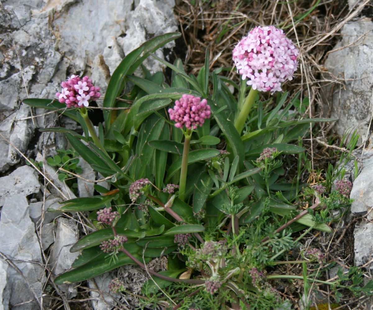 Valeriana tuberosa, Baldriangewächse (Valerianaceae) - Italien/Italia/Italy: Basilicata, Prov. Potenza, Parco Nazionale del Pollino, Massiccio del Pollino, Piano Ruggio ESE Rifugio De Gasperi